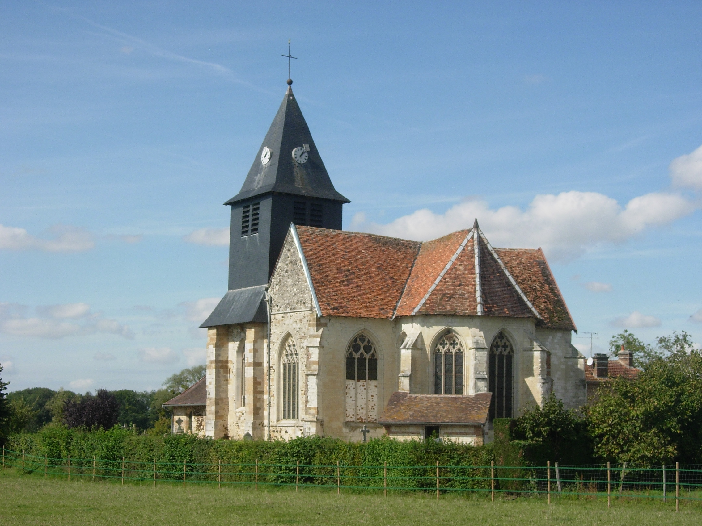 Eglise de Maizières-lès-Brienne